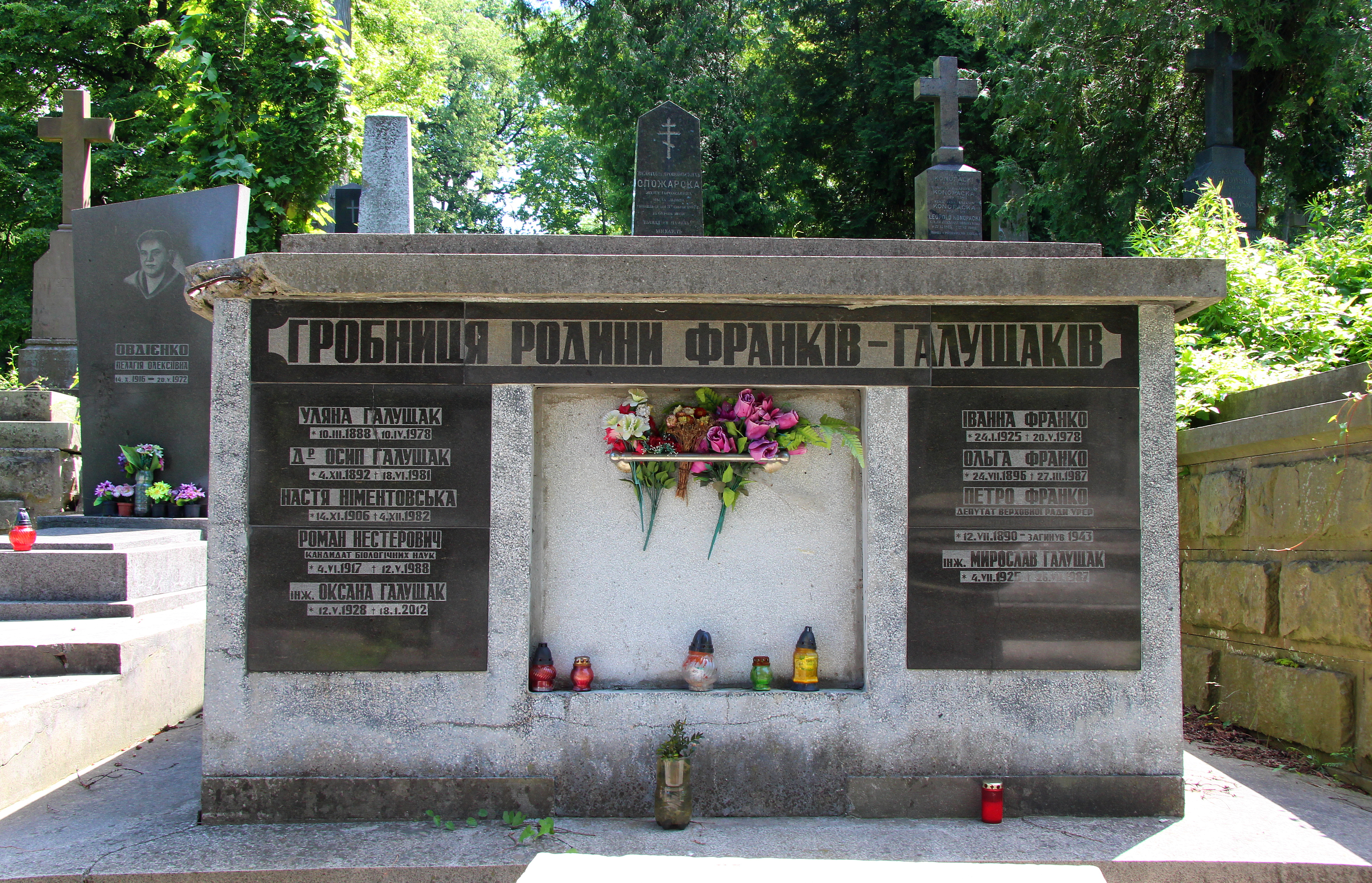 Гробівець родини Франків - Галущаків. Личаківський цвинтар , поле № 69.